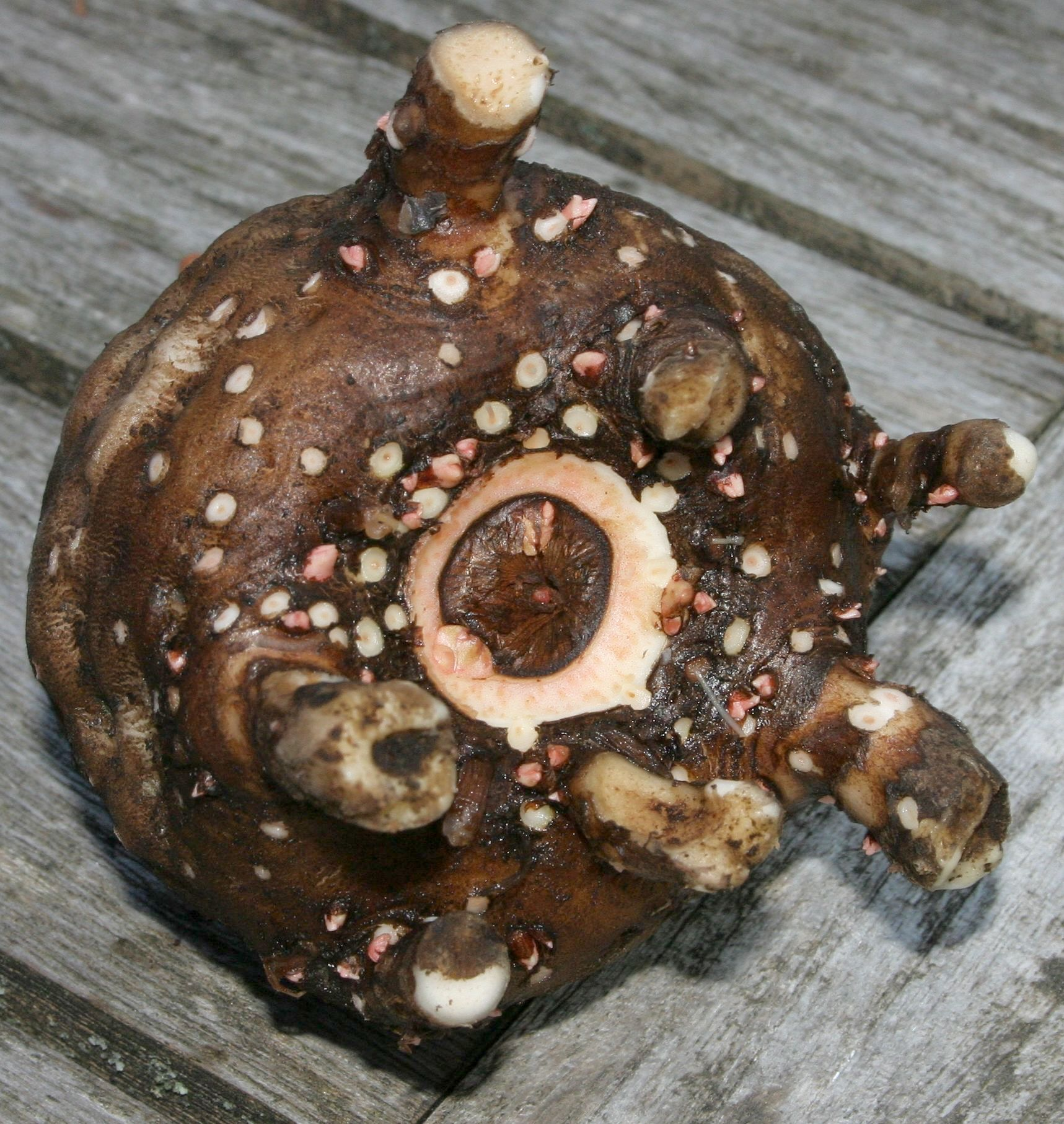 Knolle einer Amorphophallus konjac